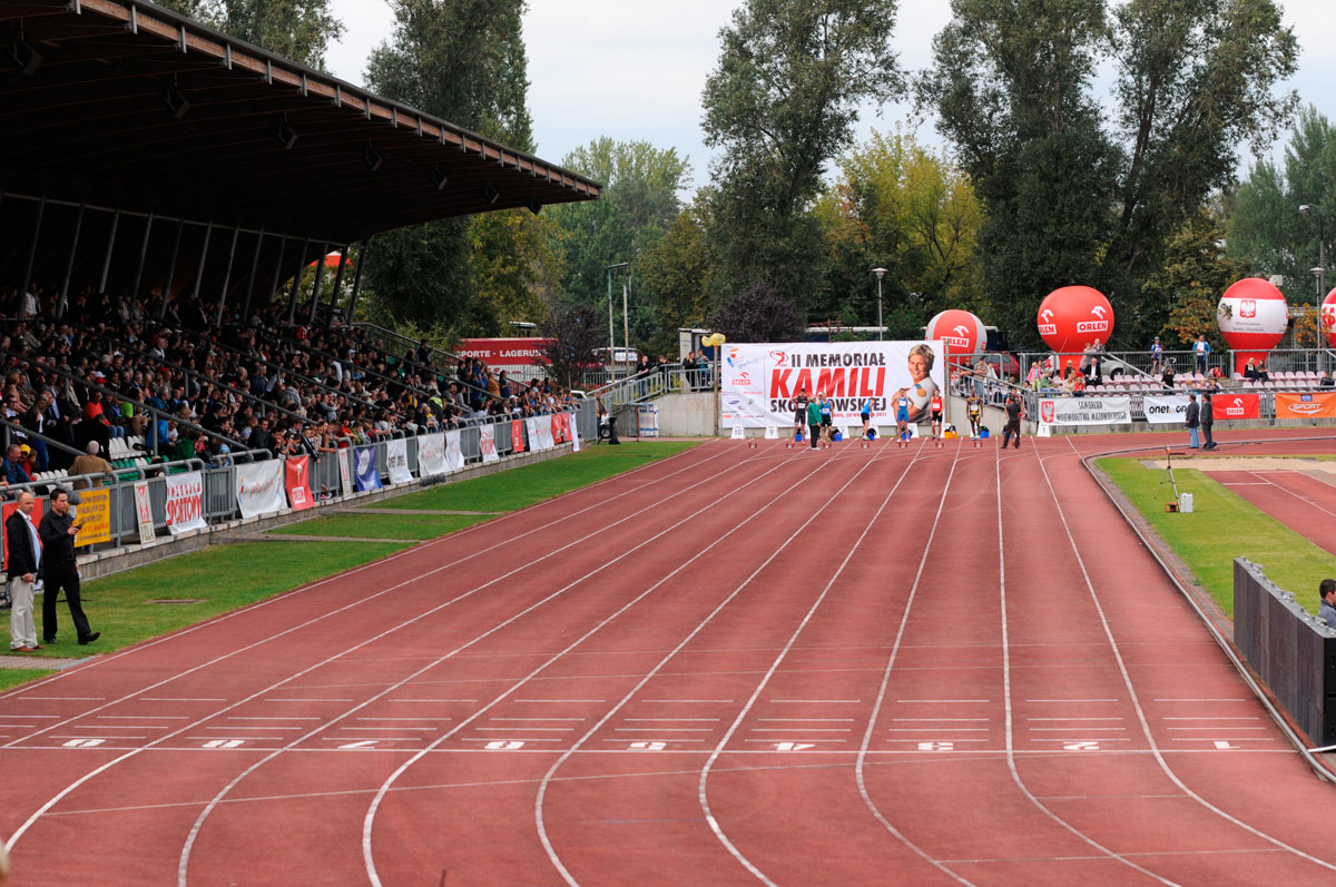 2. Memoriał Kamili Skolimowskiej, Warszawa, 20.09.2011r.